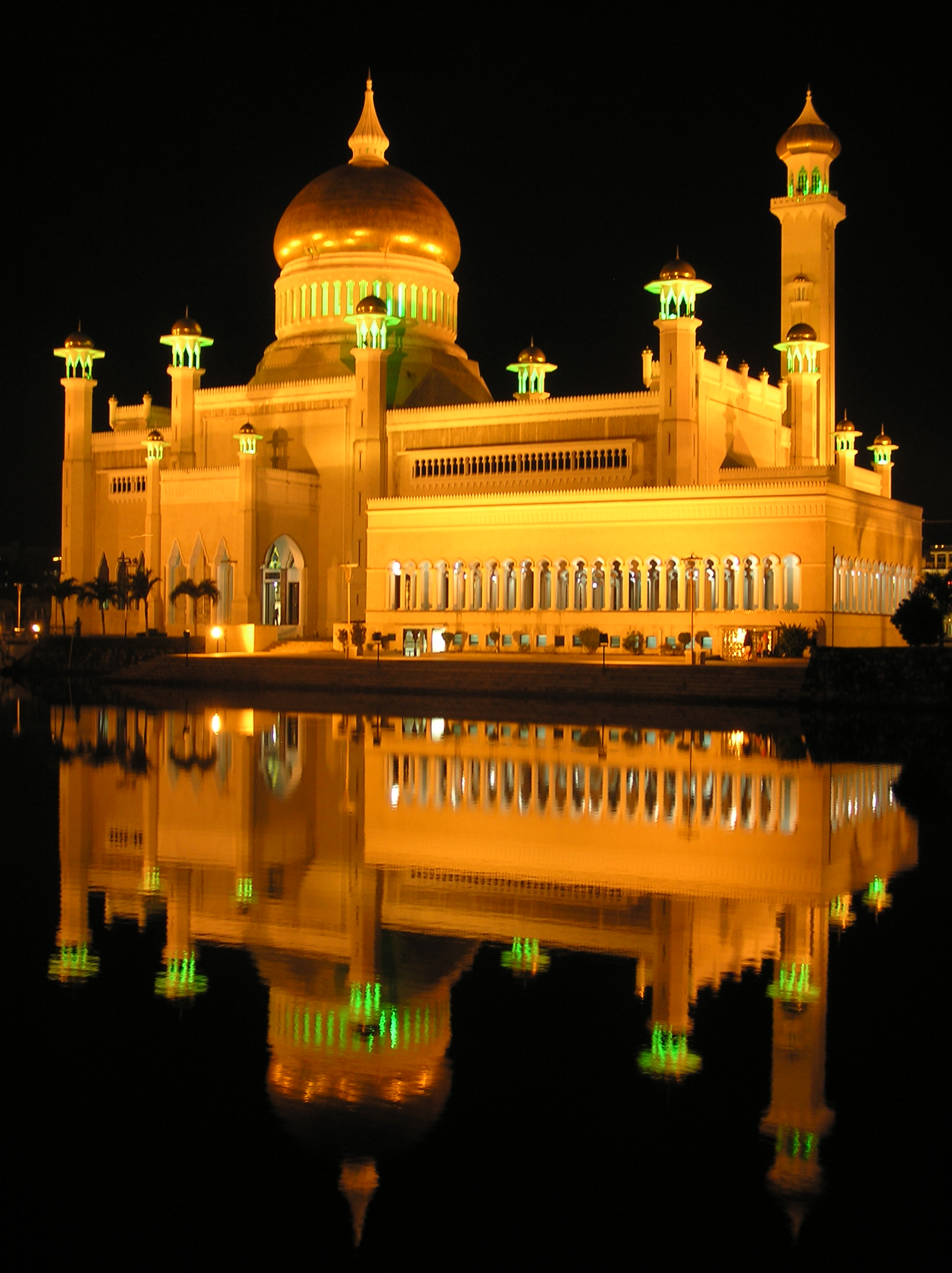 Die Omar Ali Saifuddin Mosque in Bandar Seri Begawan, Brunei Darussalam